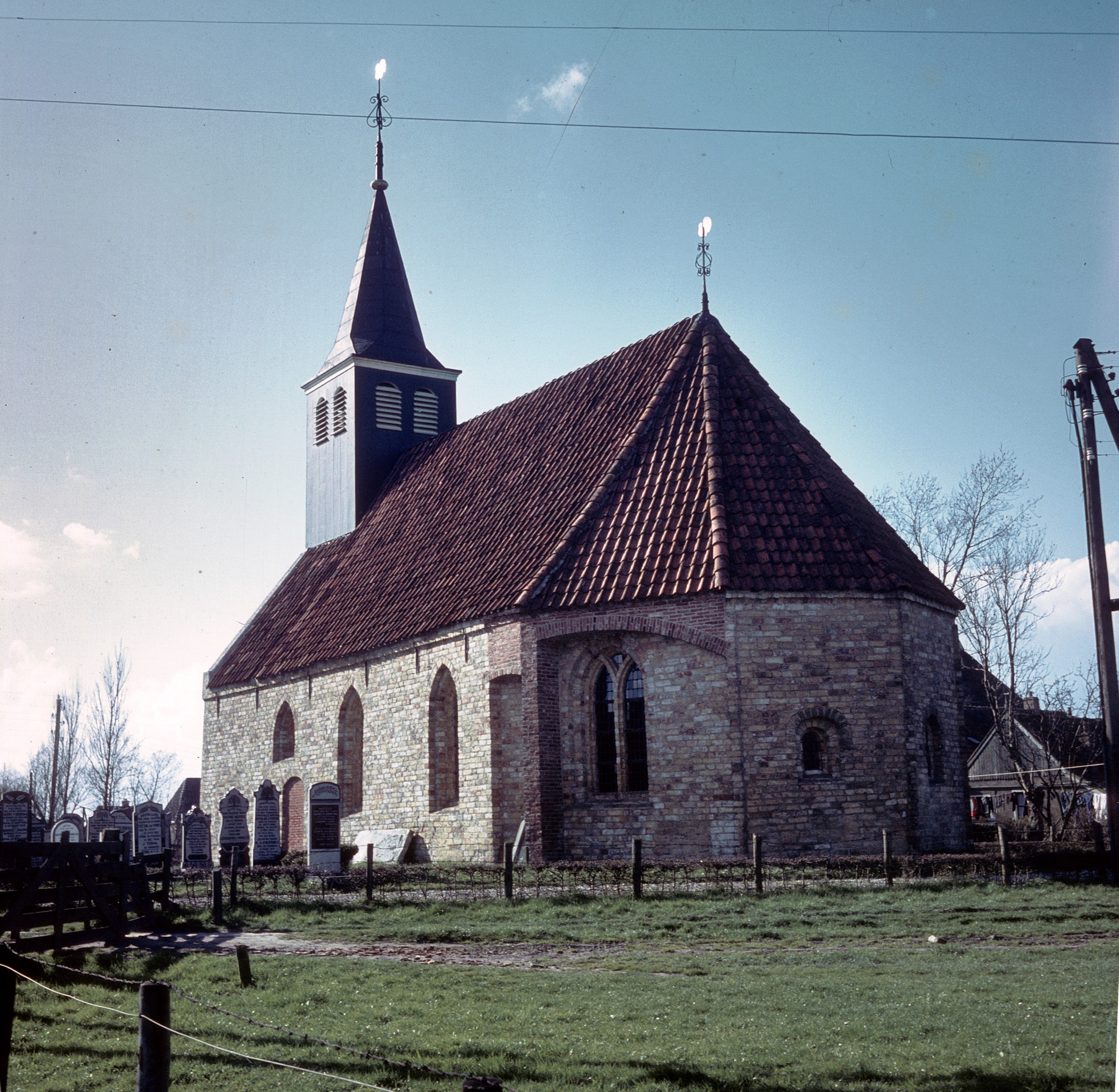 Nederlands Hervormde Kerk: Overzicht van de zuidoostgevel